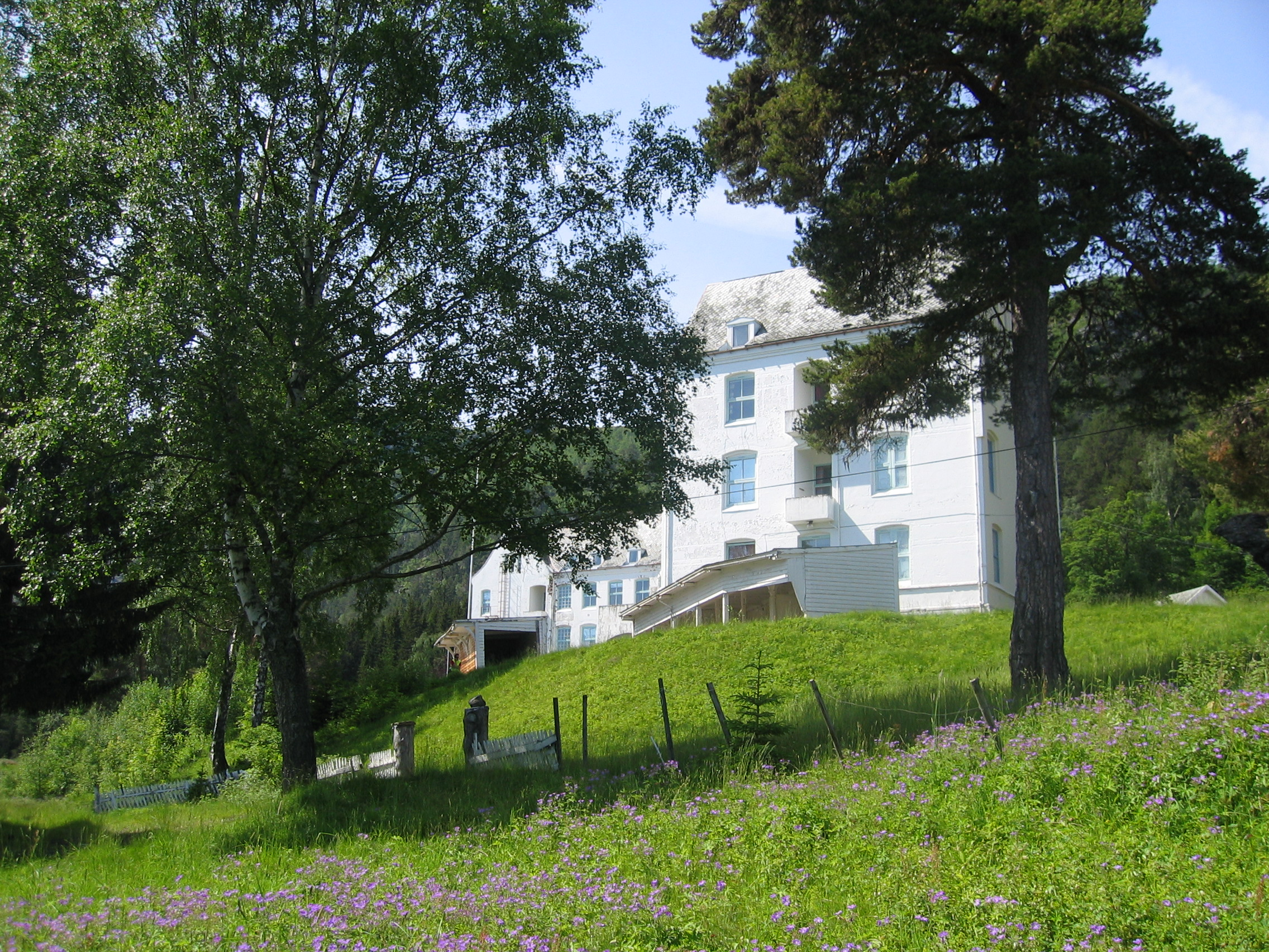 Harastølen